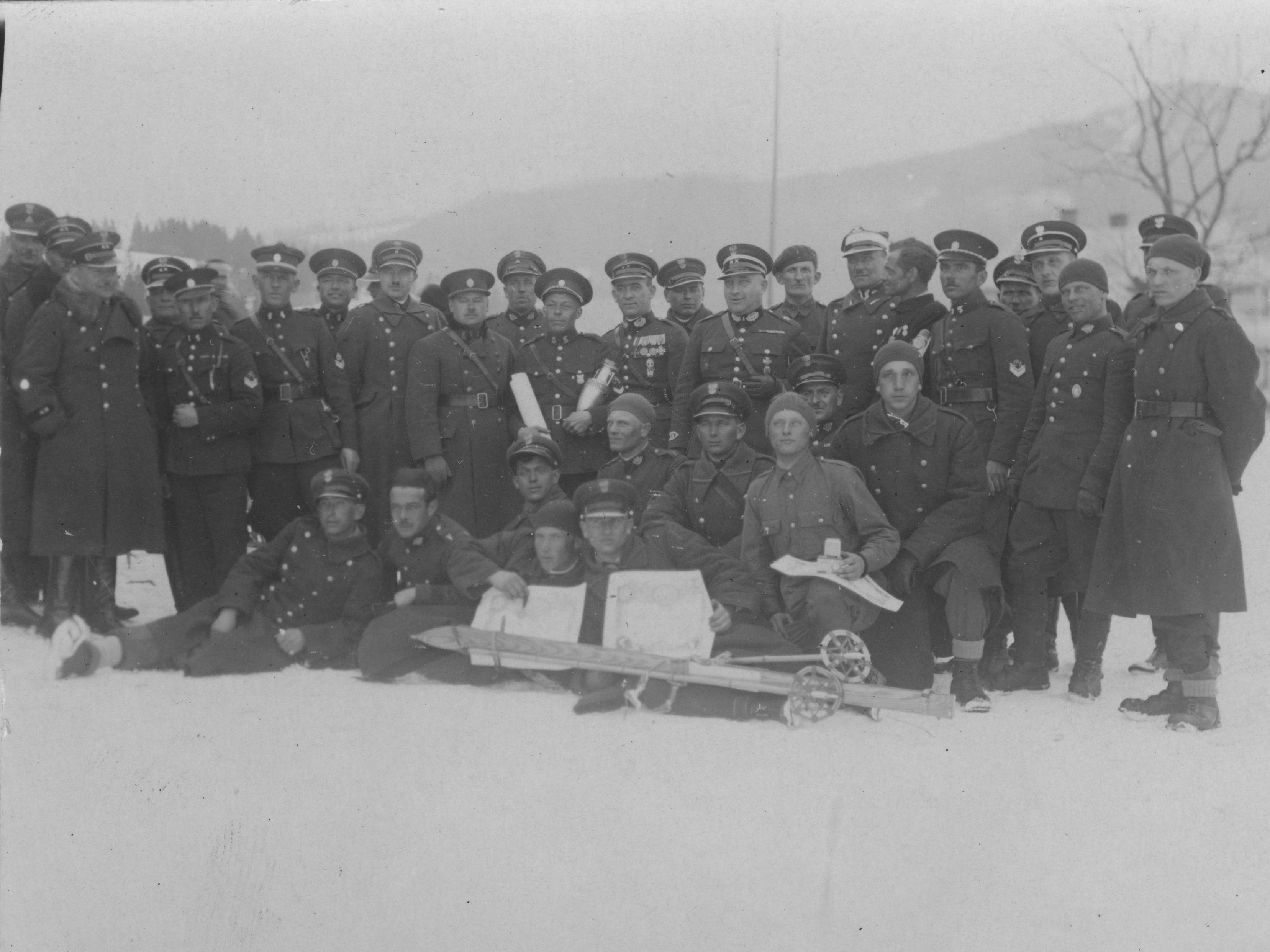 Rozdanie nagród po zawodach Straży Granicznej w Sławsku. Koncern Ilustrowany Kurier Codzienny - Archiwum Ilustracji. Sygnatura: 1-G-6502